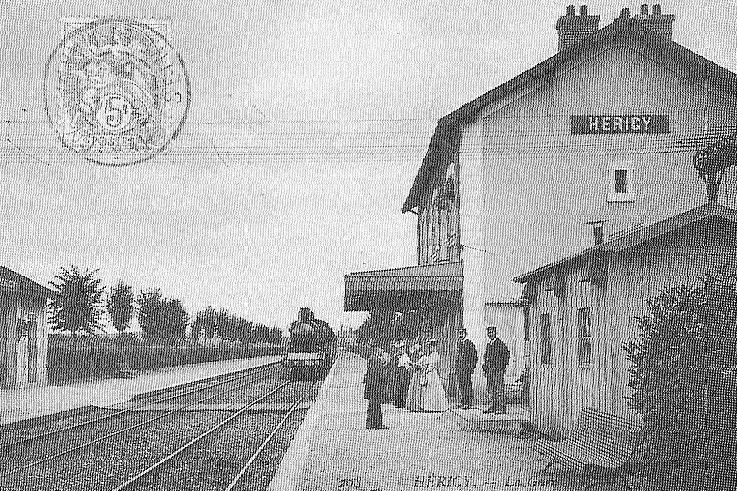 La Gare d'Héricy (Seine-et-Marne, France), au début du XX° siècle.